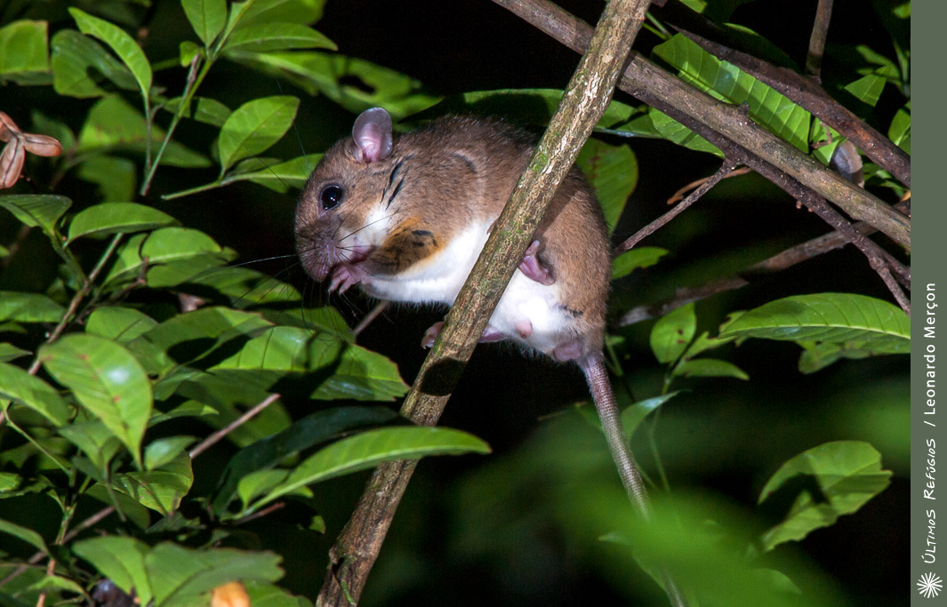 Rato-da-árvore (Rhipidomys mastacalis)